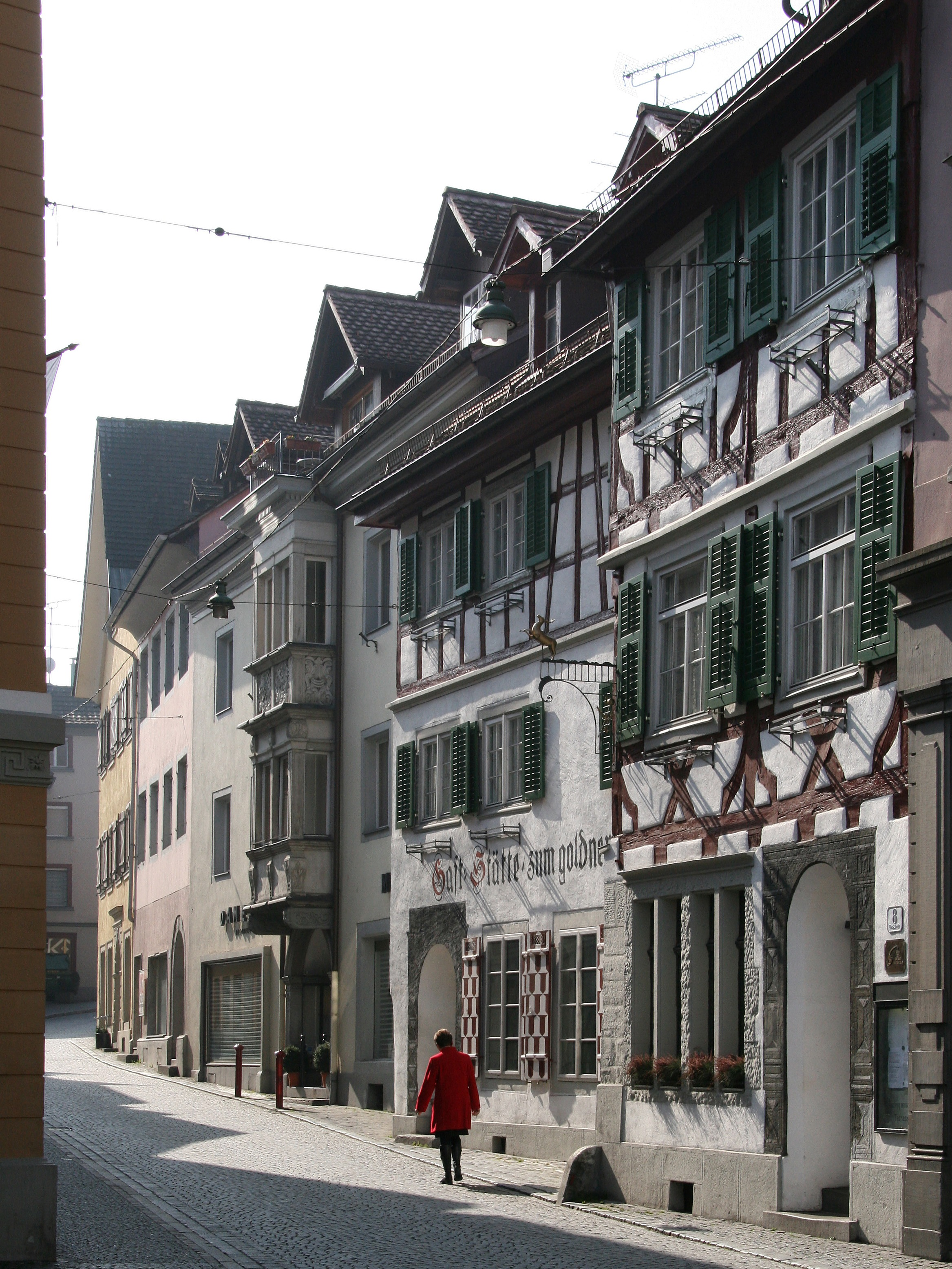 aus dem DEHIO Vorarlberg 1983: Maurachgasse Nr. 8: Kern 16./17. Jh. erweitert 1831, Umbau durch Johann Anton Tscharner 1926. 3geschossig, vor dem Fassadenrücksprung Fachwerk, Sandsteinfassungen der Fenster im Erdgeschoß, Sgraffito-Portalrahmung in Renaissanceformen. Nationalromantische Innengestaltung. Wirtshausschild. *** in Bregenz, Vorarlberg.